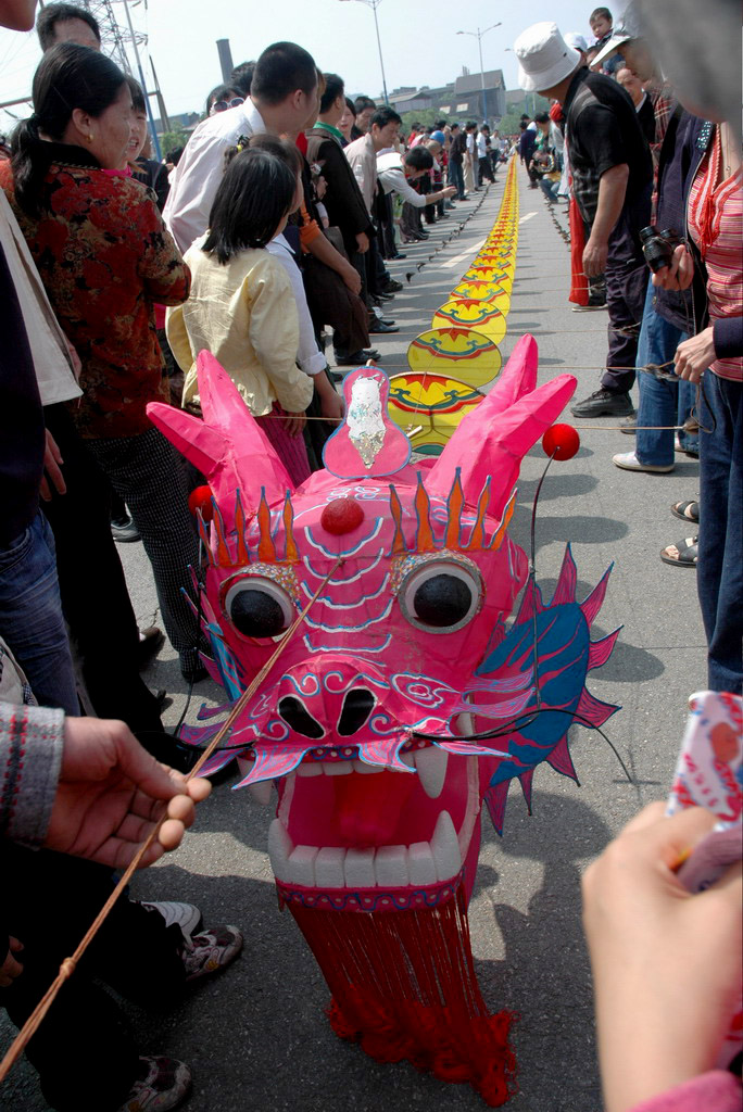 龙风筝